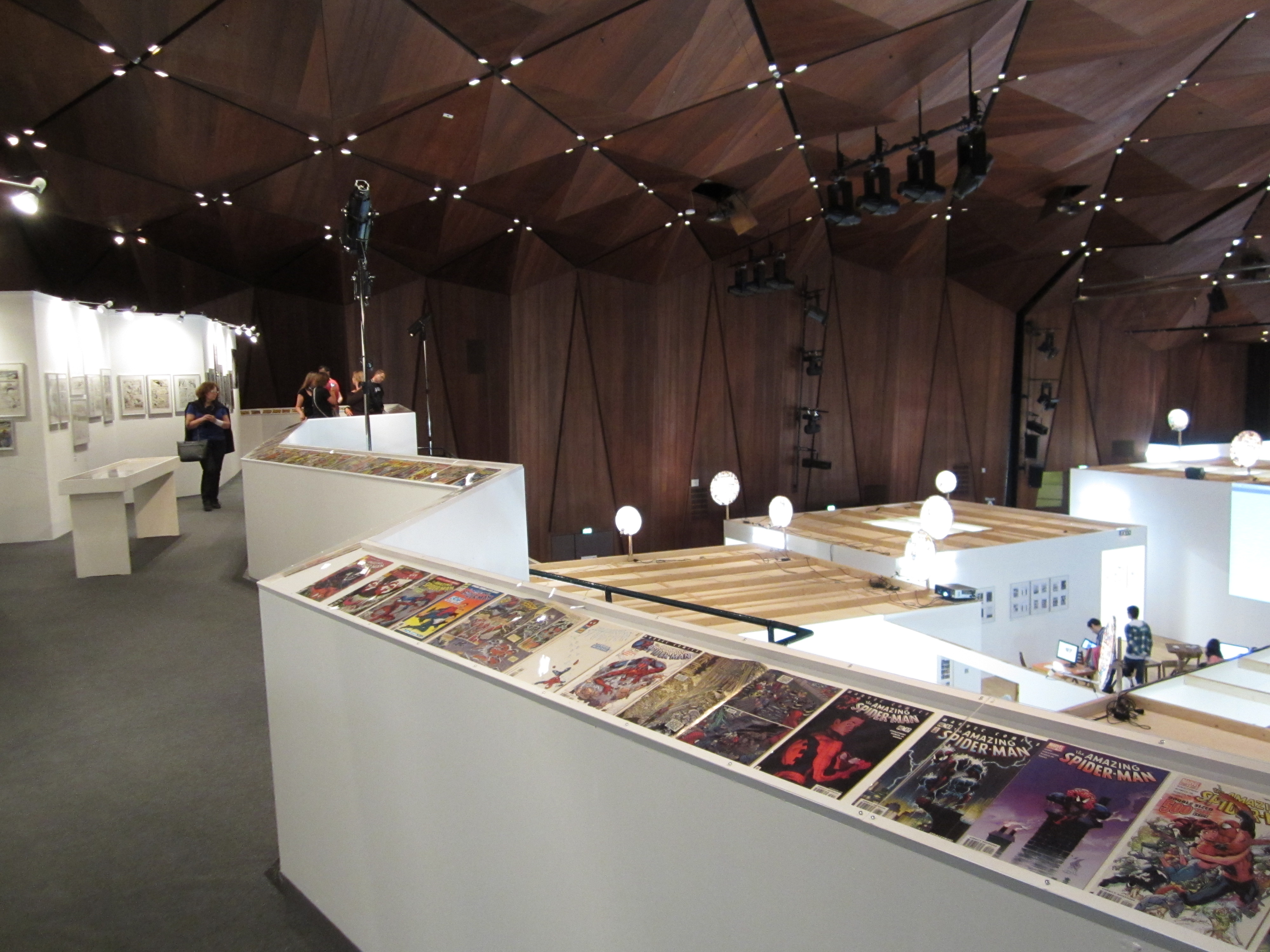 Comic-Salon Erlangen 2012, Ausstellungen in der Heinrich-Lades-Halle